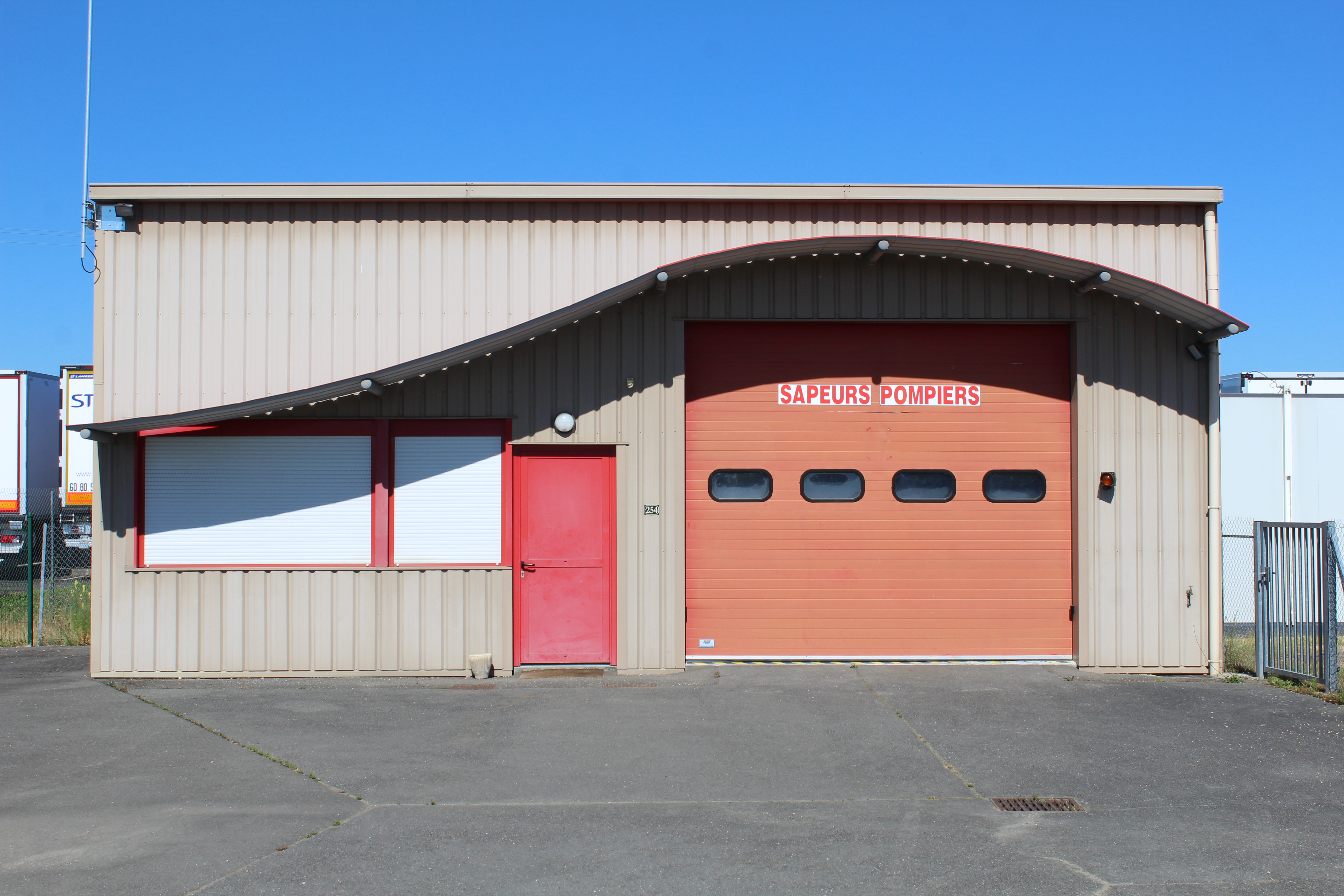 Caserne de pompiers de Saint-Cyr-sur-Menthon.